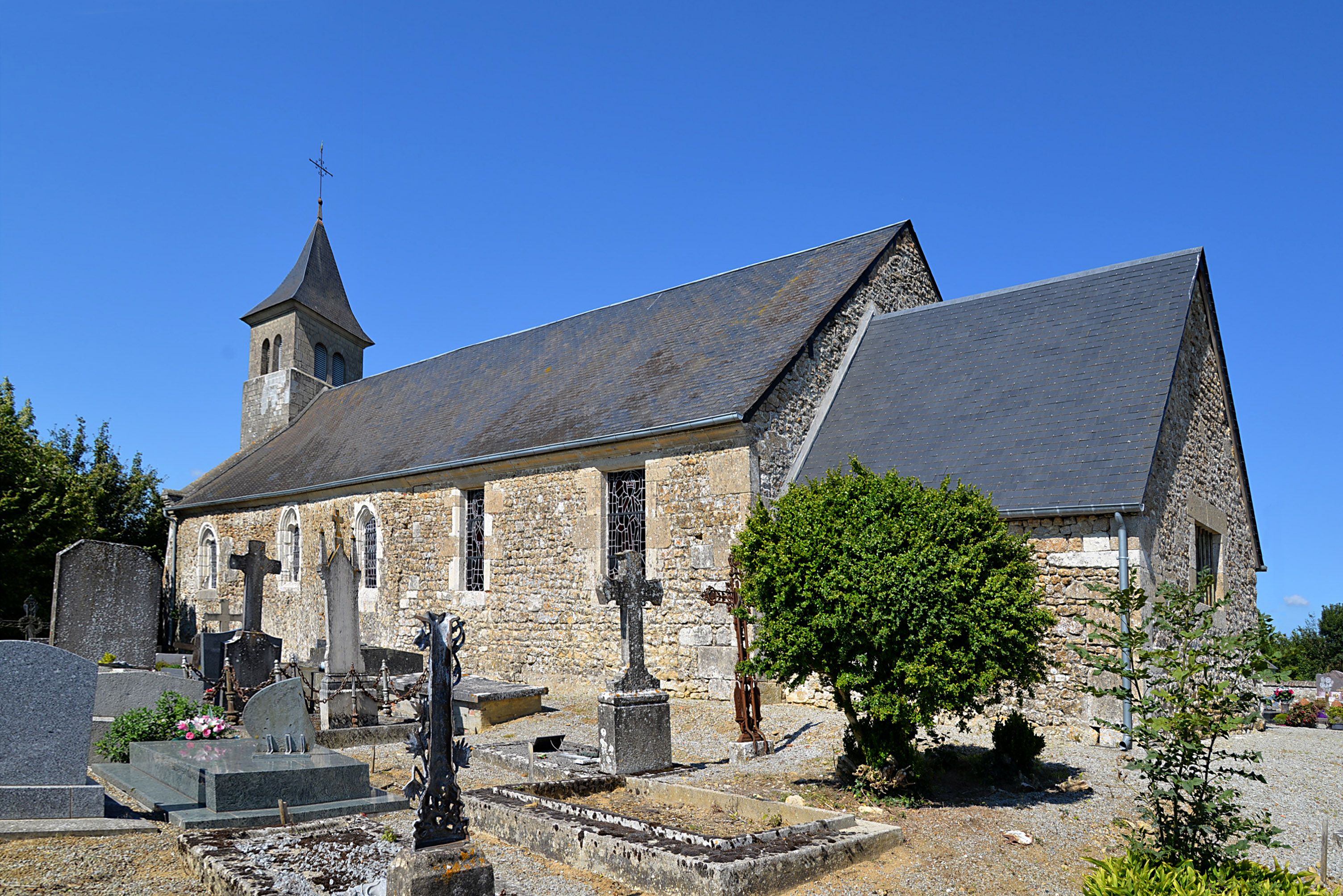 Ménil-Froger (Orne)